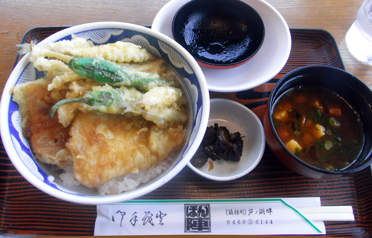 芦ノ湖丼。“ブラックバス(丼手前)、ニジマス(丼左の赤身の魚)、ワカサギ(シシトウの上)の天ぷらが入ったどんぶりです。ブラックバスは普通の白身魚と思いました。単なる天丼としてはお高め。観光地価格にしても通常の天丼より高いです。まあ、一度食べれば二度はないかと。” Ricoh Caplio R6